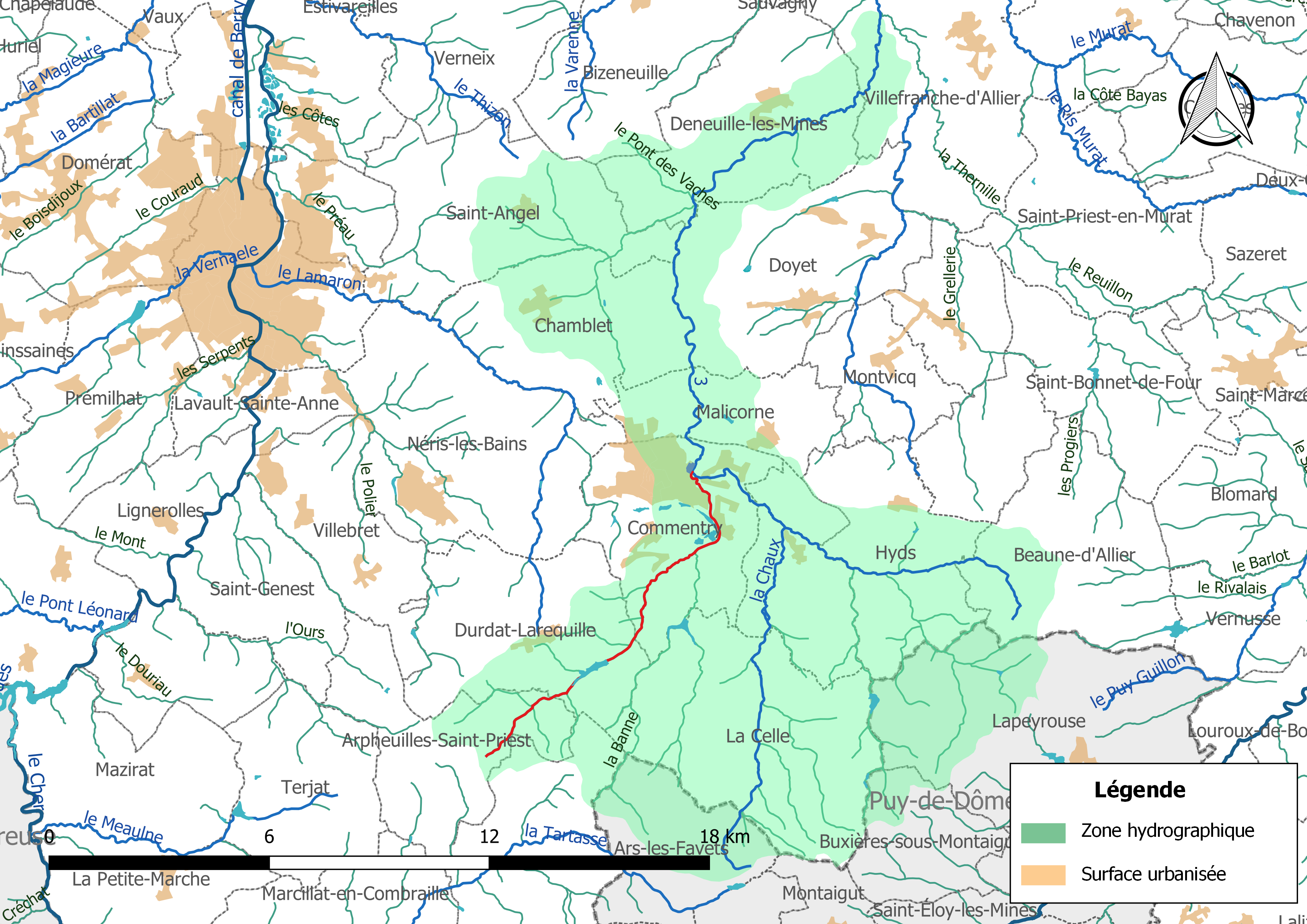 Carte du cours d'eau « le Banny » (France) et de la zone hydrographique dans laquelle il s'insère.